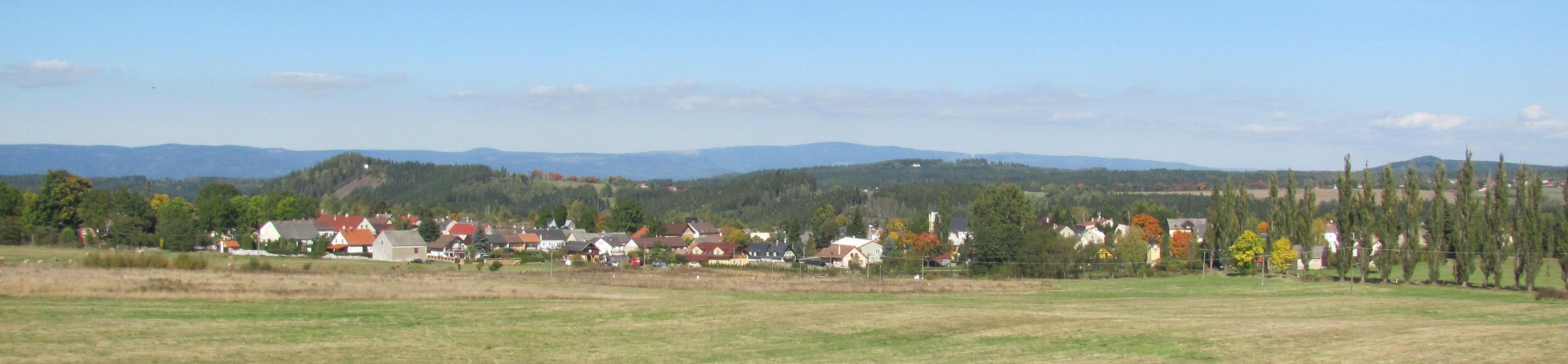 Česky: Stanovice, pohled z jihu